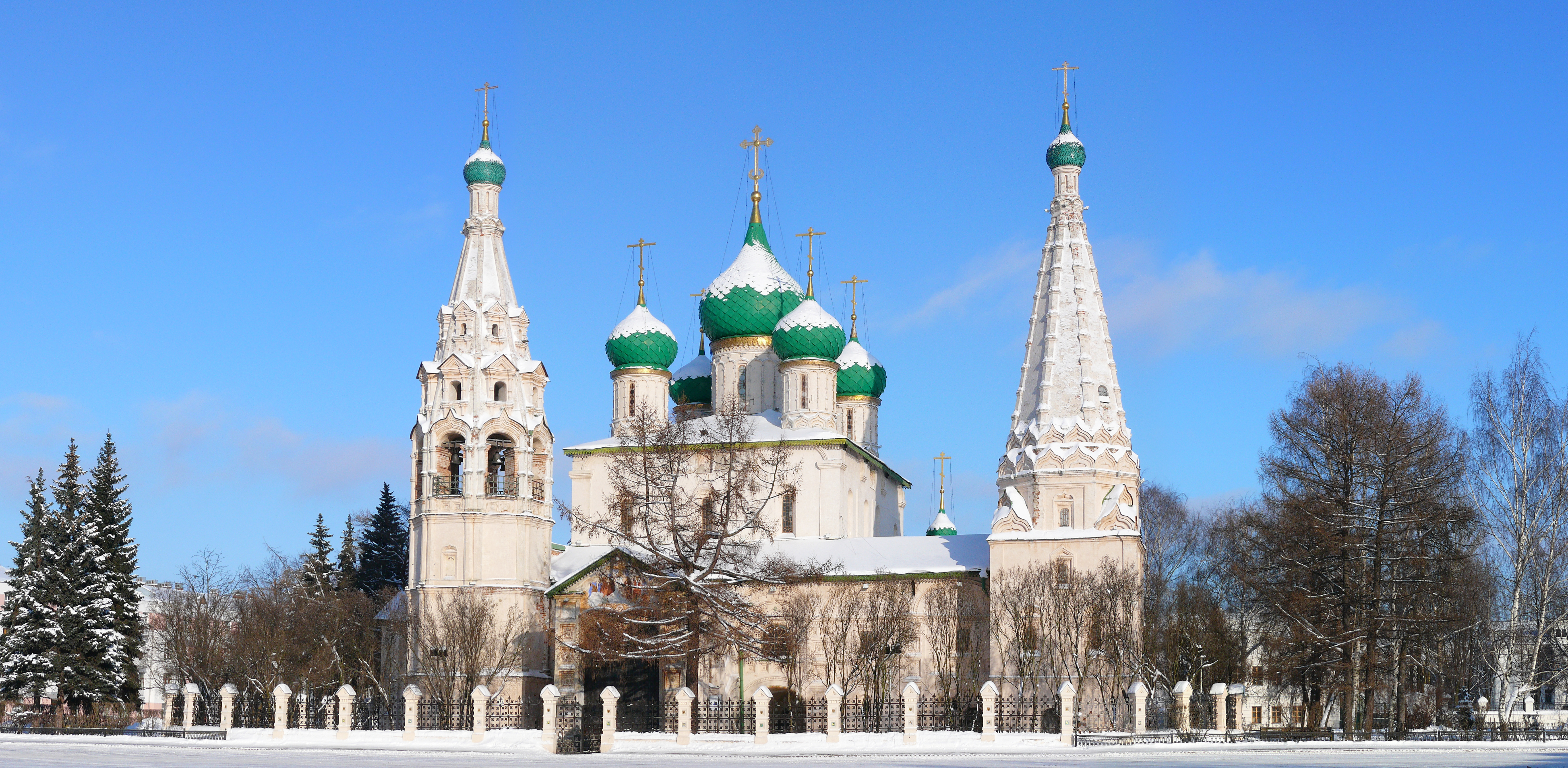 Комплекс церкви Ильи Пророка (Ярославская область, Ярославль, Советская площадь)